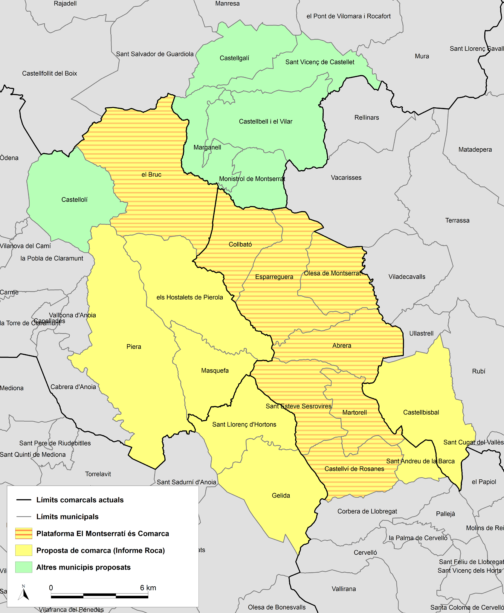 Mapa del Montserratí